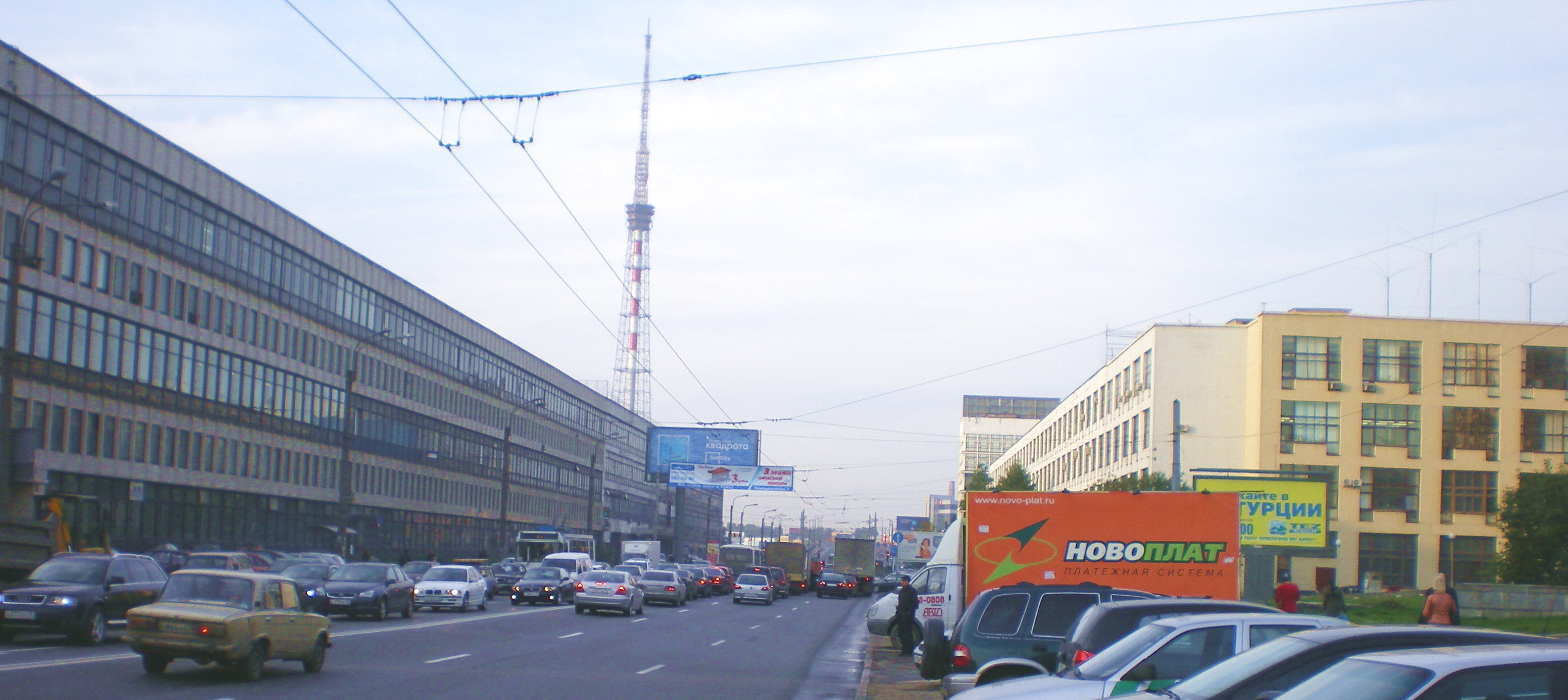 Кантемировская улица в Санкт-Петербурге - вид на запад в сторону Кантемировского моста. Телебашня.